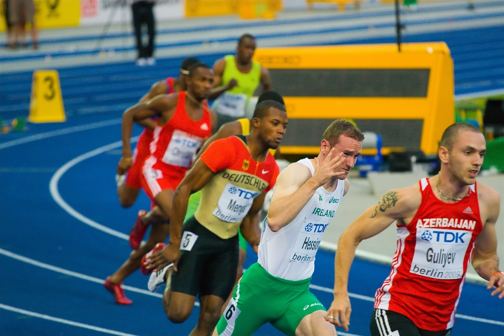 Viertelfinale 200m